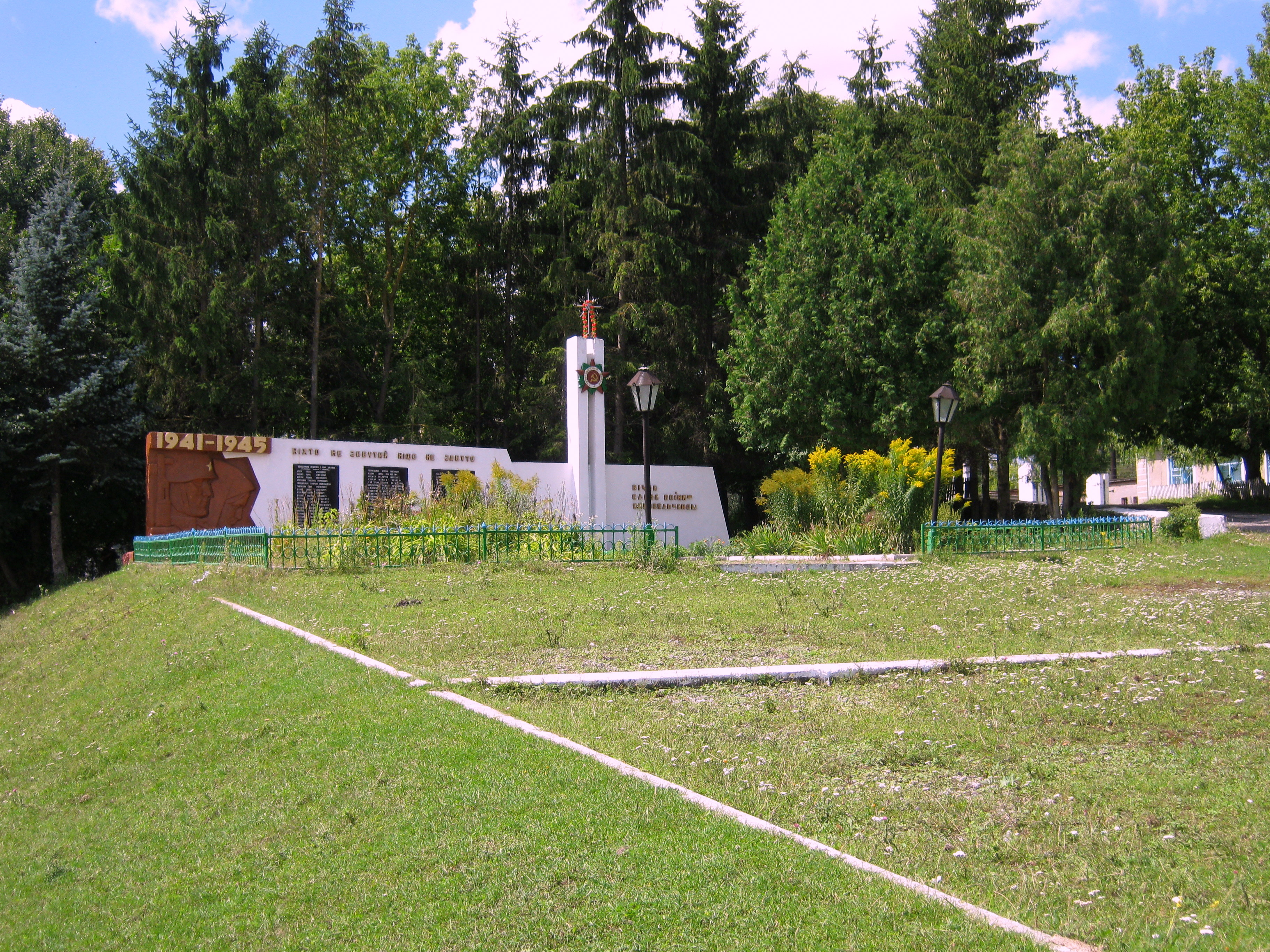 Пам'ятник воїнам-односельцям, полеглим у німецько-радянській війні у селі Млинівці Кременецького району Тернопільської області